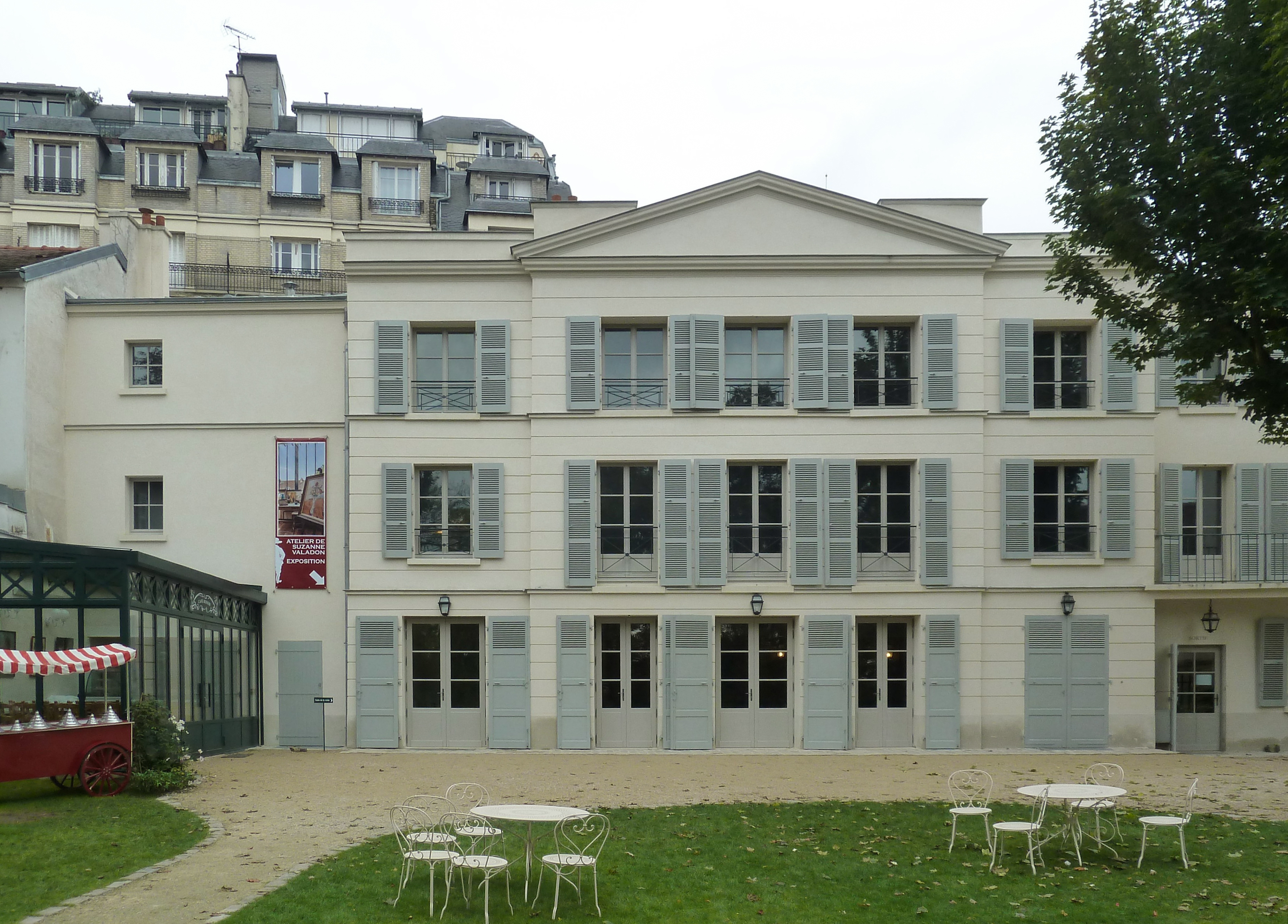 Les Jardins Renoir du Musée de Montmartre , Rue Cortot, Paris.- France